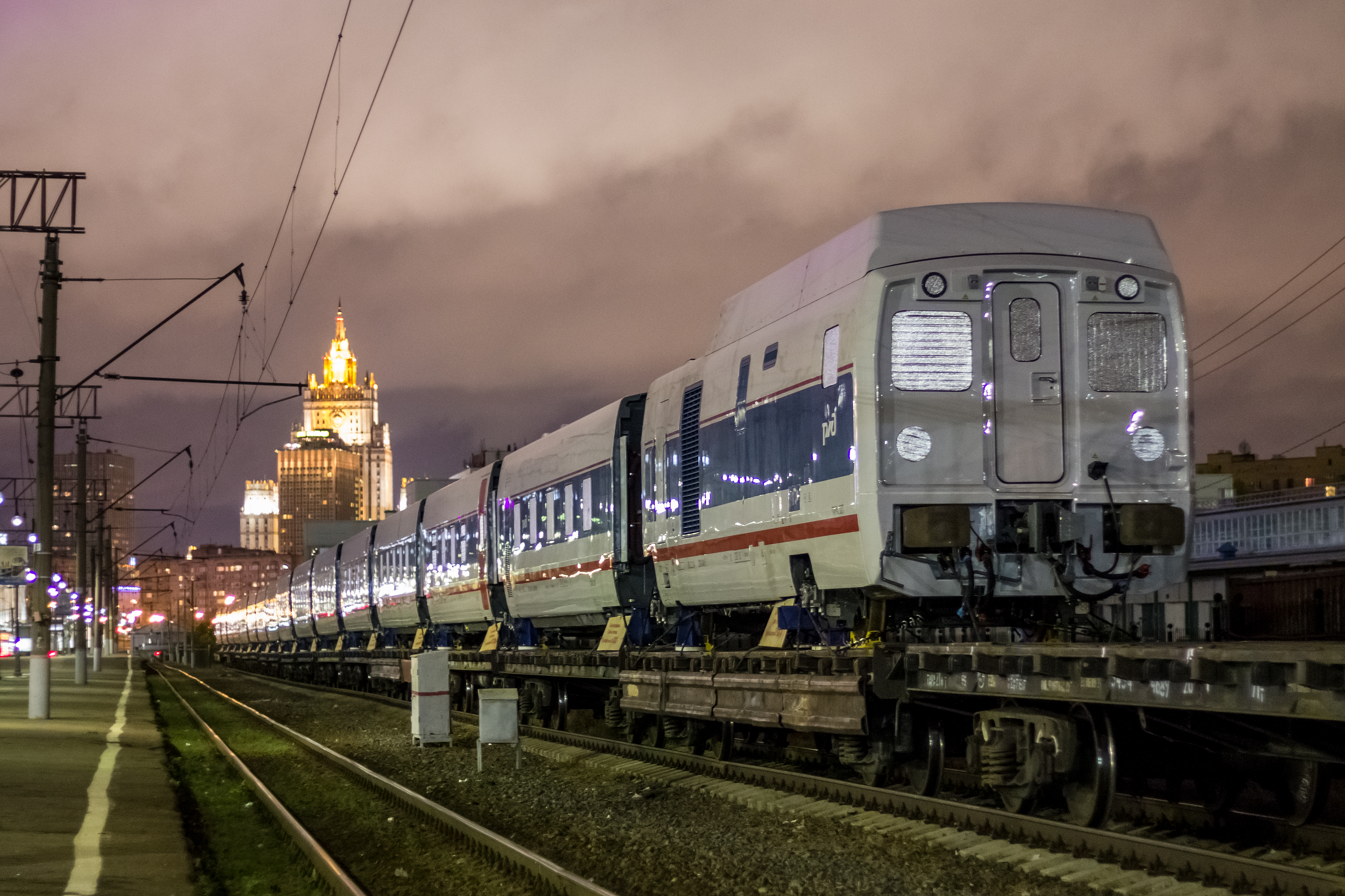 Вагоны поезда Talgo «Стриж» на грузовых платформах на Киевском вокзале Москвы см. фото 704290 в альбоме автора